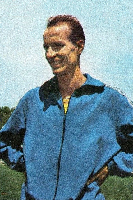 CAMPIONI dello SPORT 1969/70-n.35- NORPOTH - GERMANIA OCC.-ATLETICA-Rec